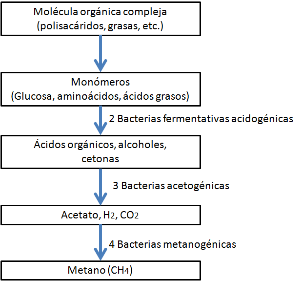 Esquema del proceso de la digestión anerobia en las lagunas anaeróbias; Molécula orgánica compleja (polisacáridos, grasas, etc.) Monómeros ucosa, aminoácidos, ácidos gra 2 Bacterias fermentativas acidogénicas Ácidos orgánicos, alcoholes, cetonas 3 Bacterias acetogénicas Acetato, H2, C02 4 Bacterias metanogénicas Metano (CH4)